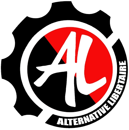 Logo Alternative Libertaire